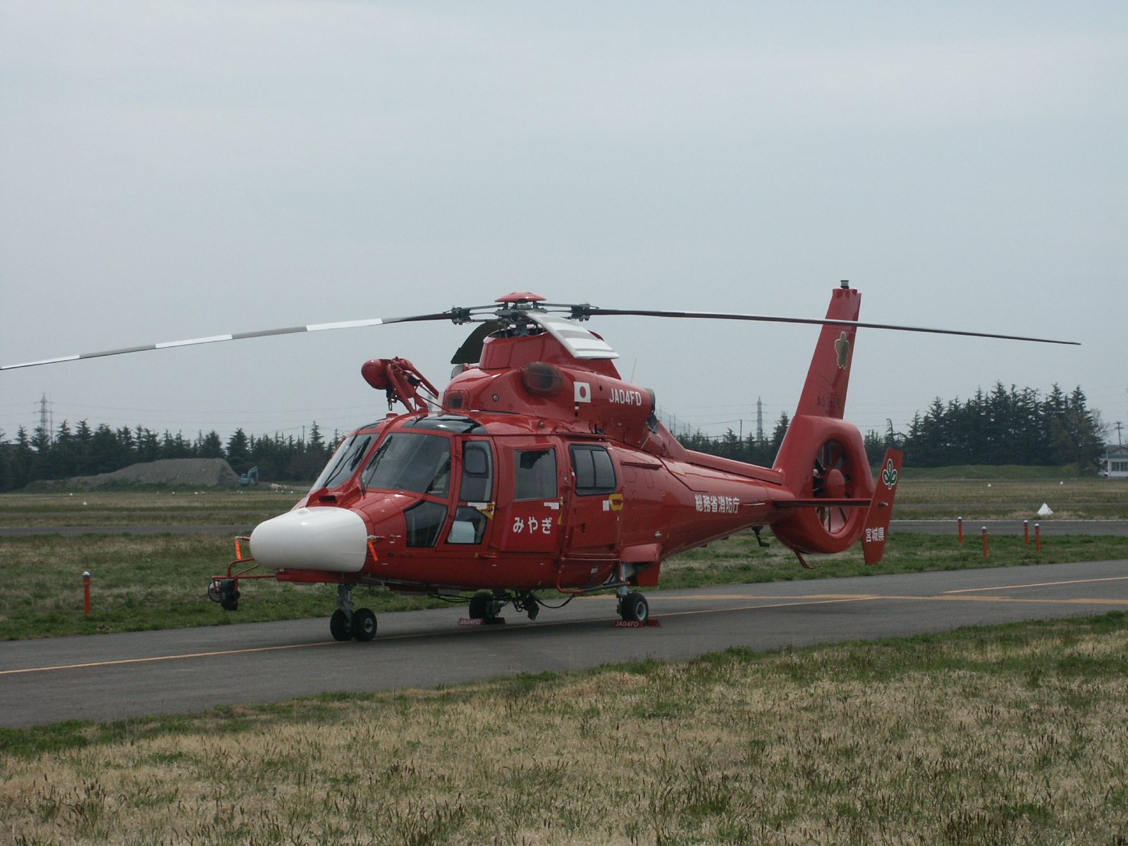 宮城県防災航空隊が使用している総務省消防庁消防防災ヘリコプター「みやぎ」 AS365_Dauphin JA04FD